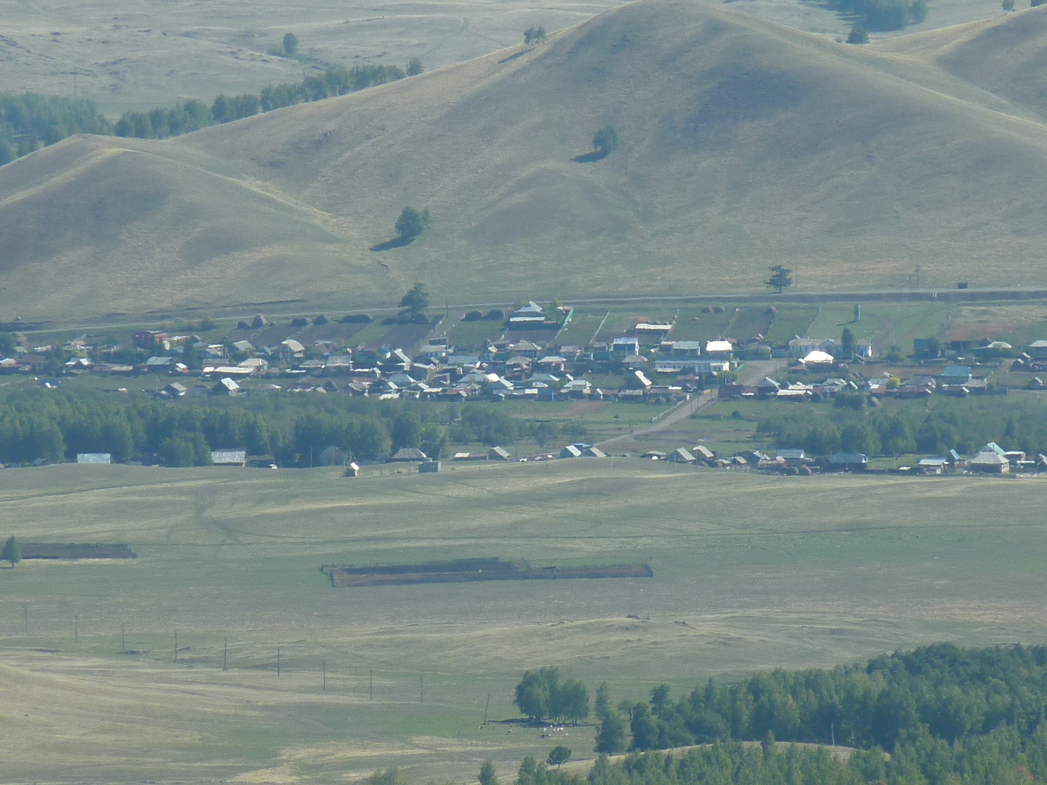 Вид на деревню Кужаново